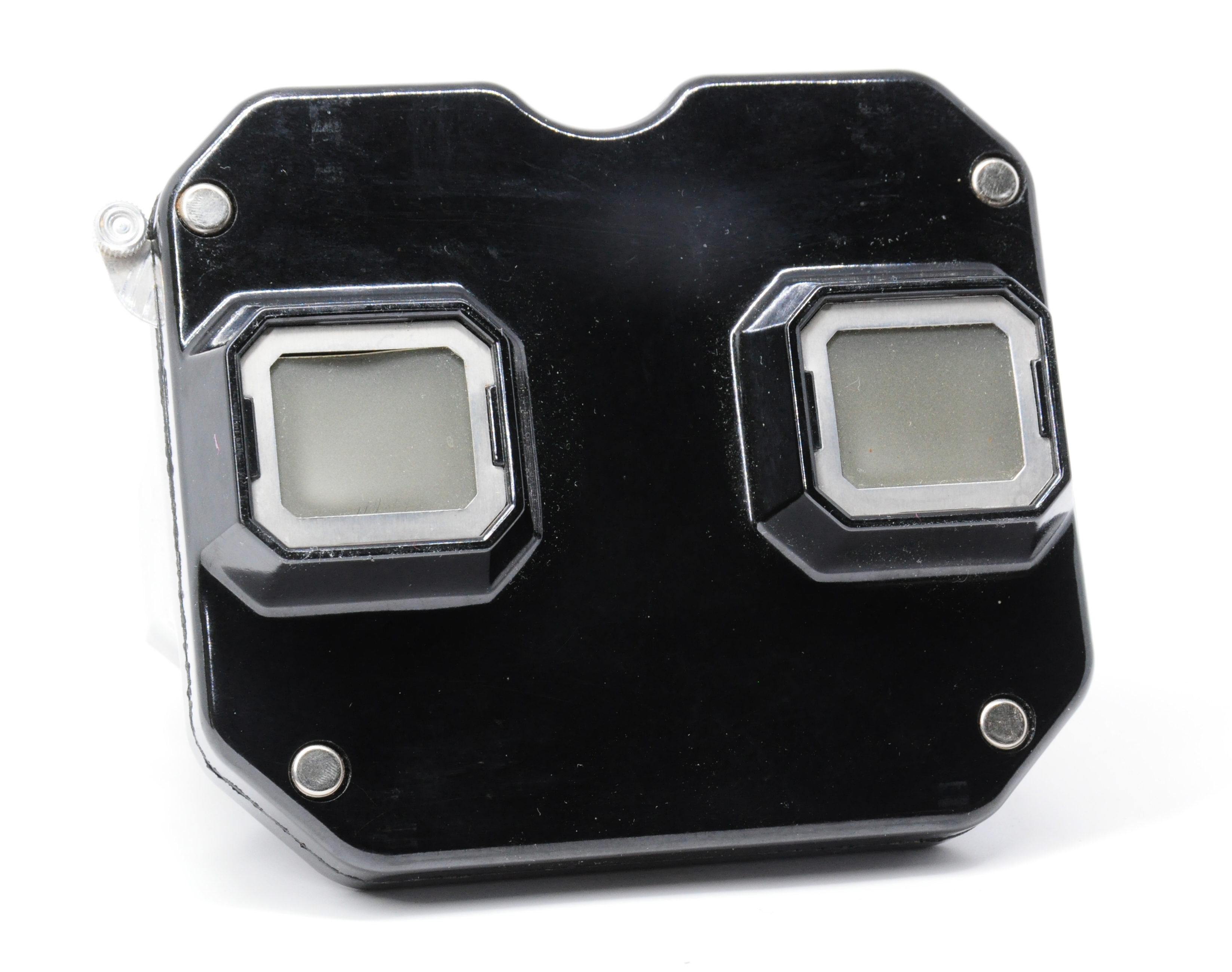 กล้องวิวมาสเตอร์ โมเดล C วัสดุ แบ็กกะไลต์ (เบคิไลต์)